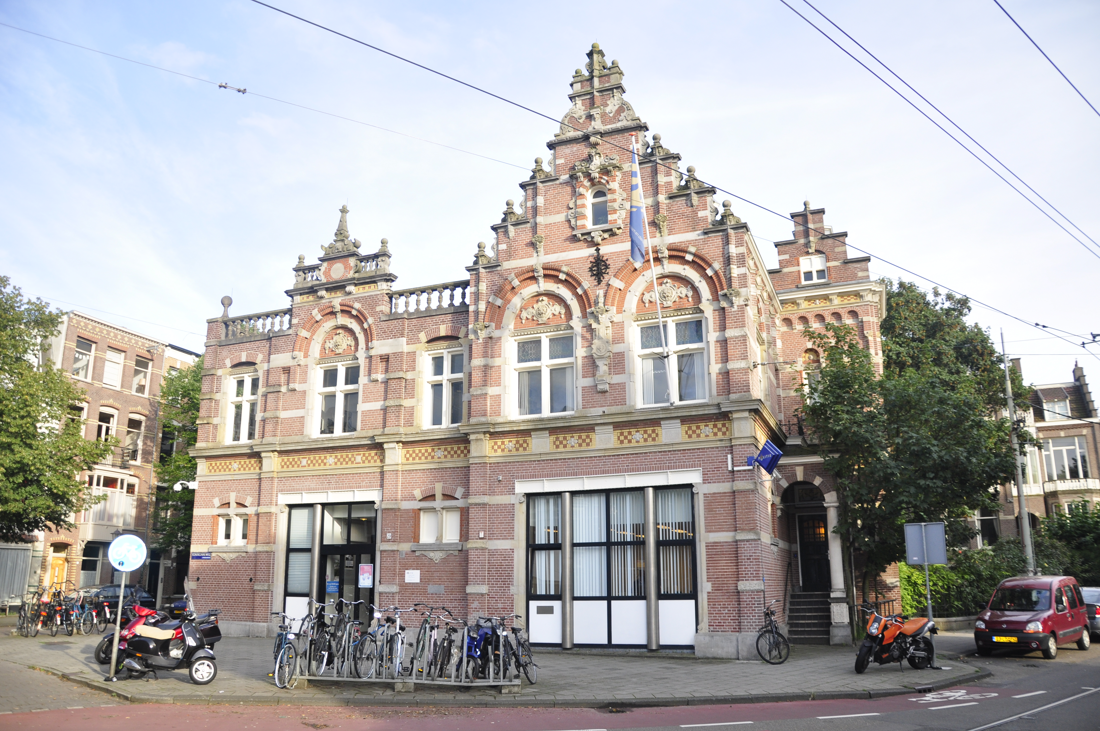 Holland, Amsterdam, Polizeistation am Koniginneweg